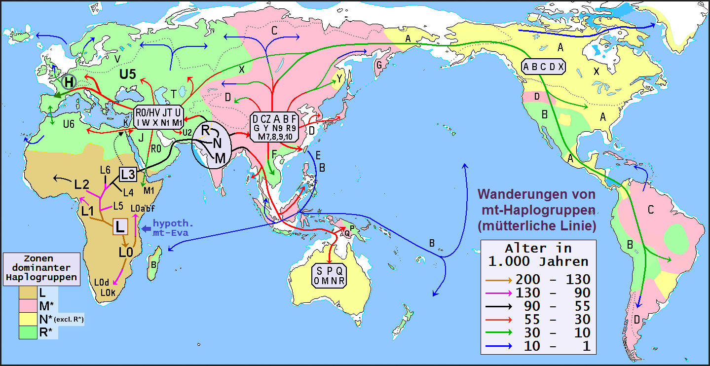 Wanderung von mt-Haplogruppen von Afrika nach Eurasien